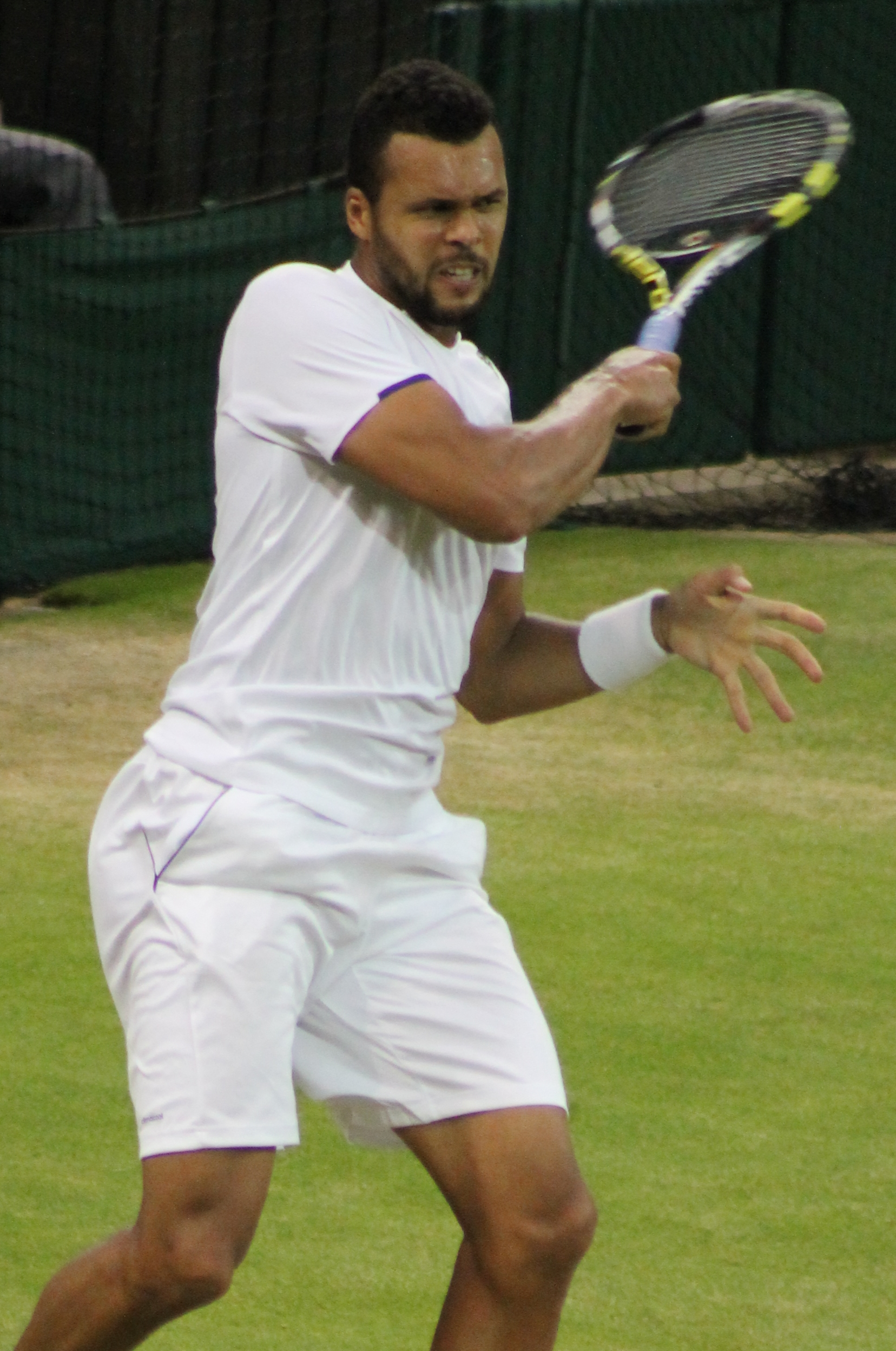 Tsonga WM14 (4)